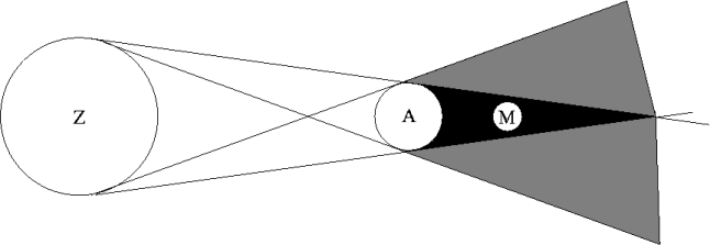 Maansverduistering, kleinere afbeelding (oorspronkelijke afbeelding van Hooft)